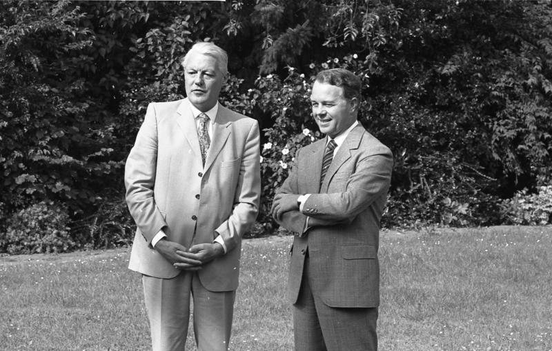 Konferenz der Ministerpräsidenten der CDU/CSU-regierten Länder in der Landesvertretung Niedersachsen, Bonn. Thema: Sparprogramm der Bundesregierung